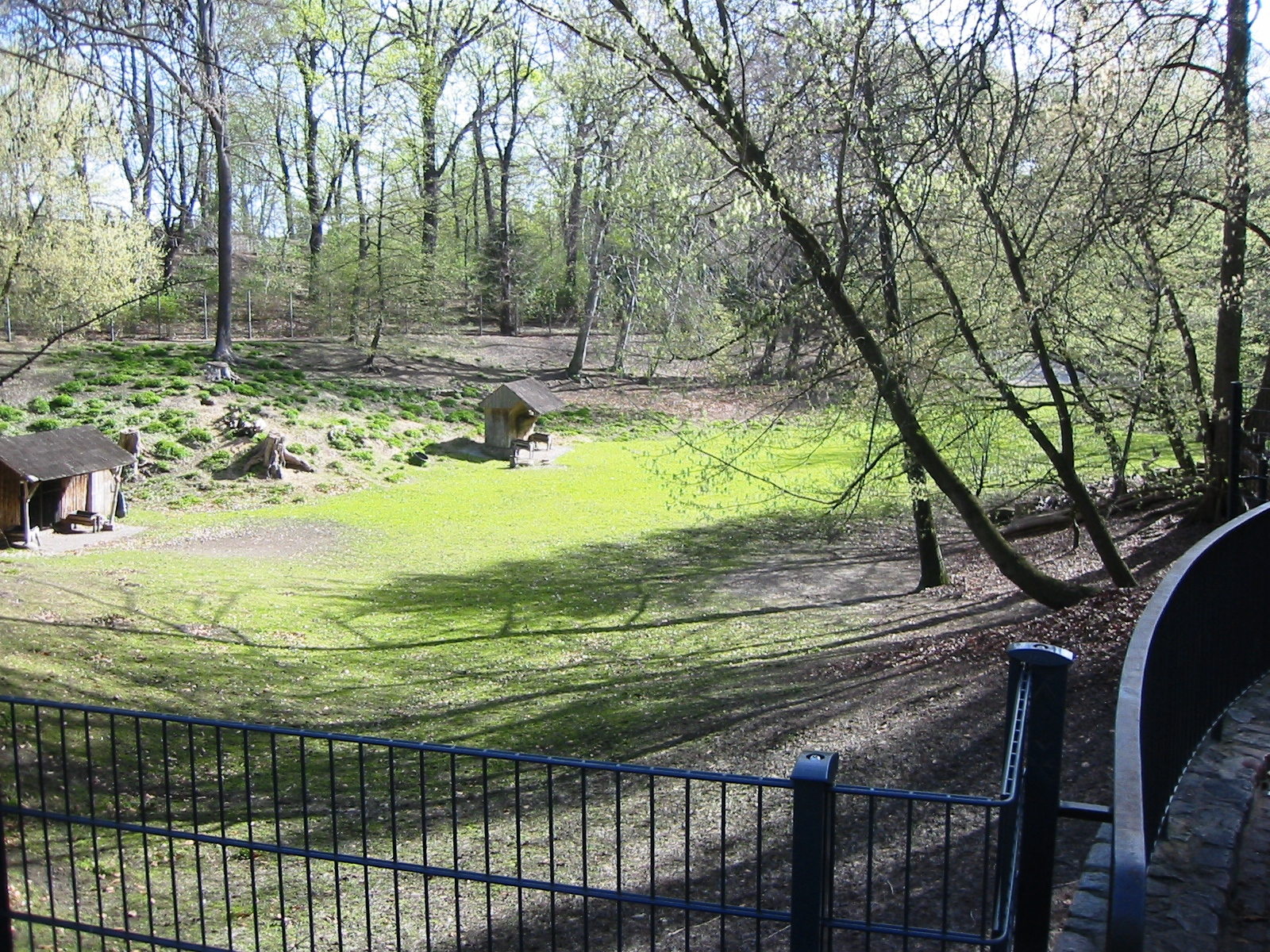 Blick in das Gehege im Franckepark in Berlin-Tempelhof